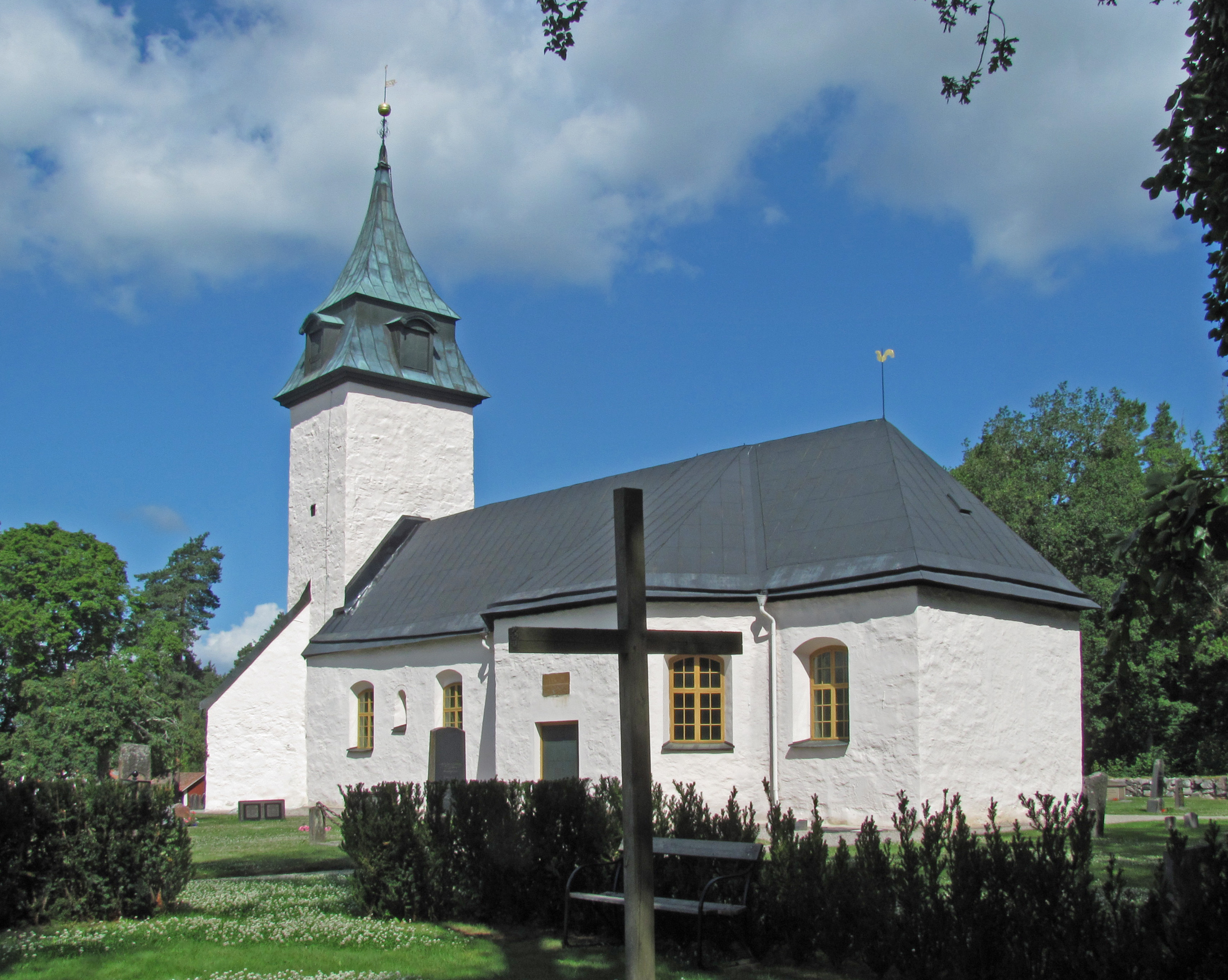 Sundby kyrka